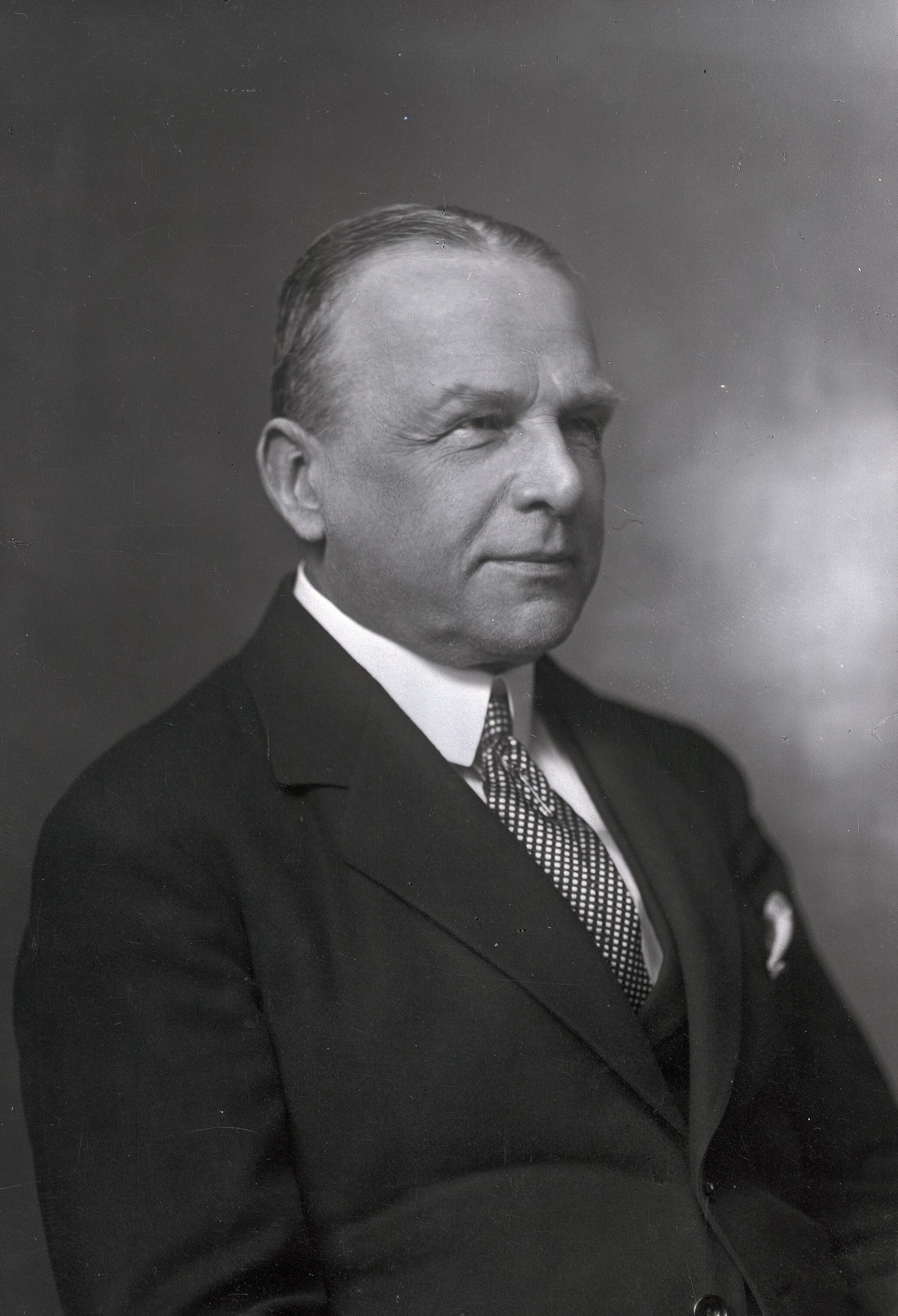 Michael Petersen Friis(født 22. oktober 1857, død 24. april 1944). Dansk embedsmand og statsminister fra 5. april 1920 til 5. maj 1920.